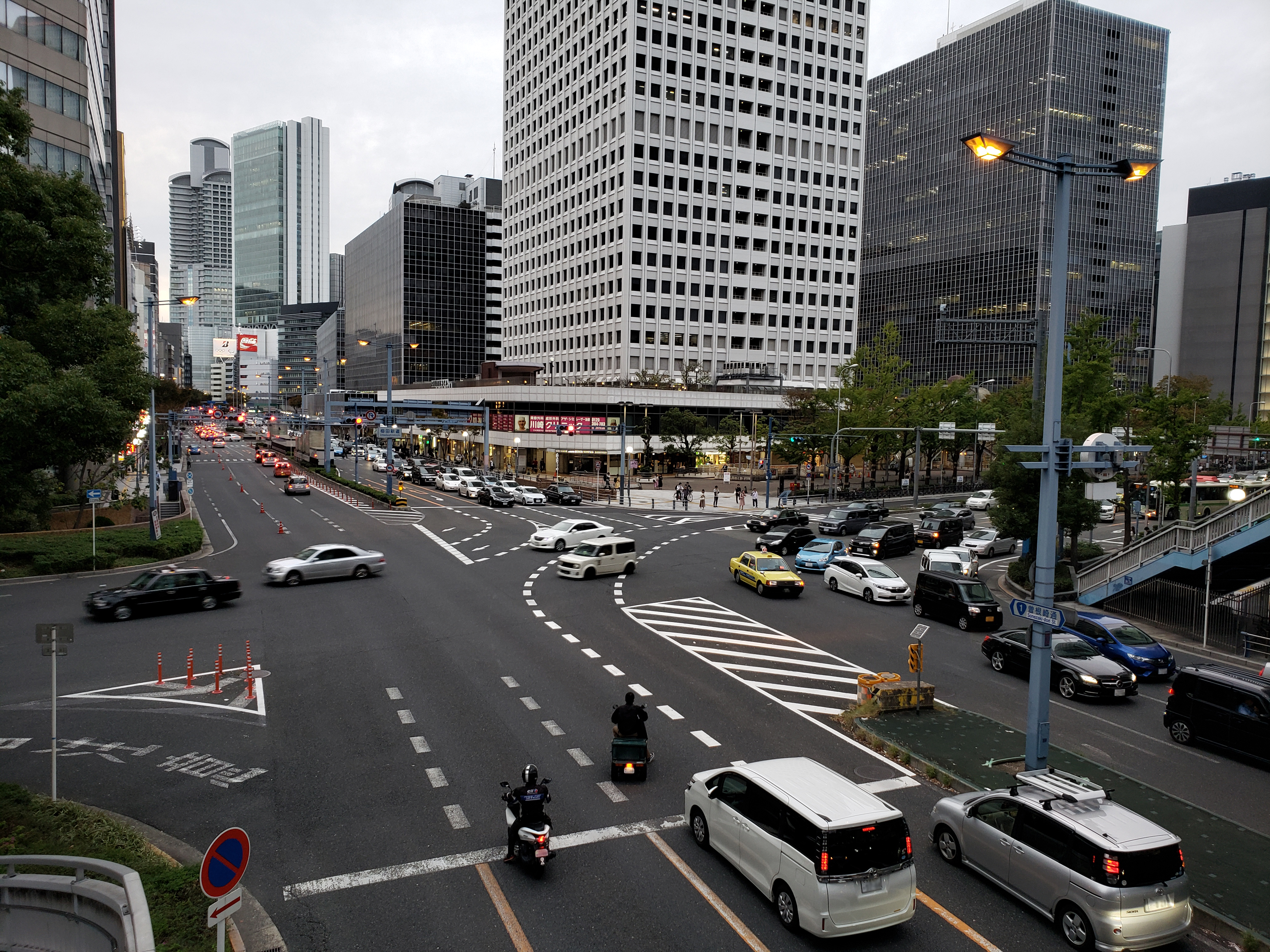 梅田新道交差点